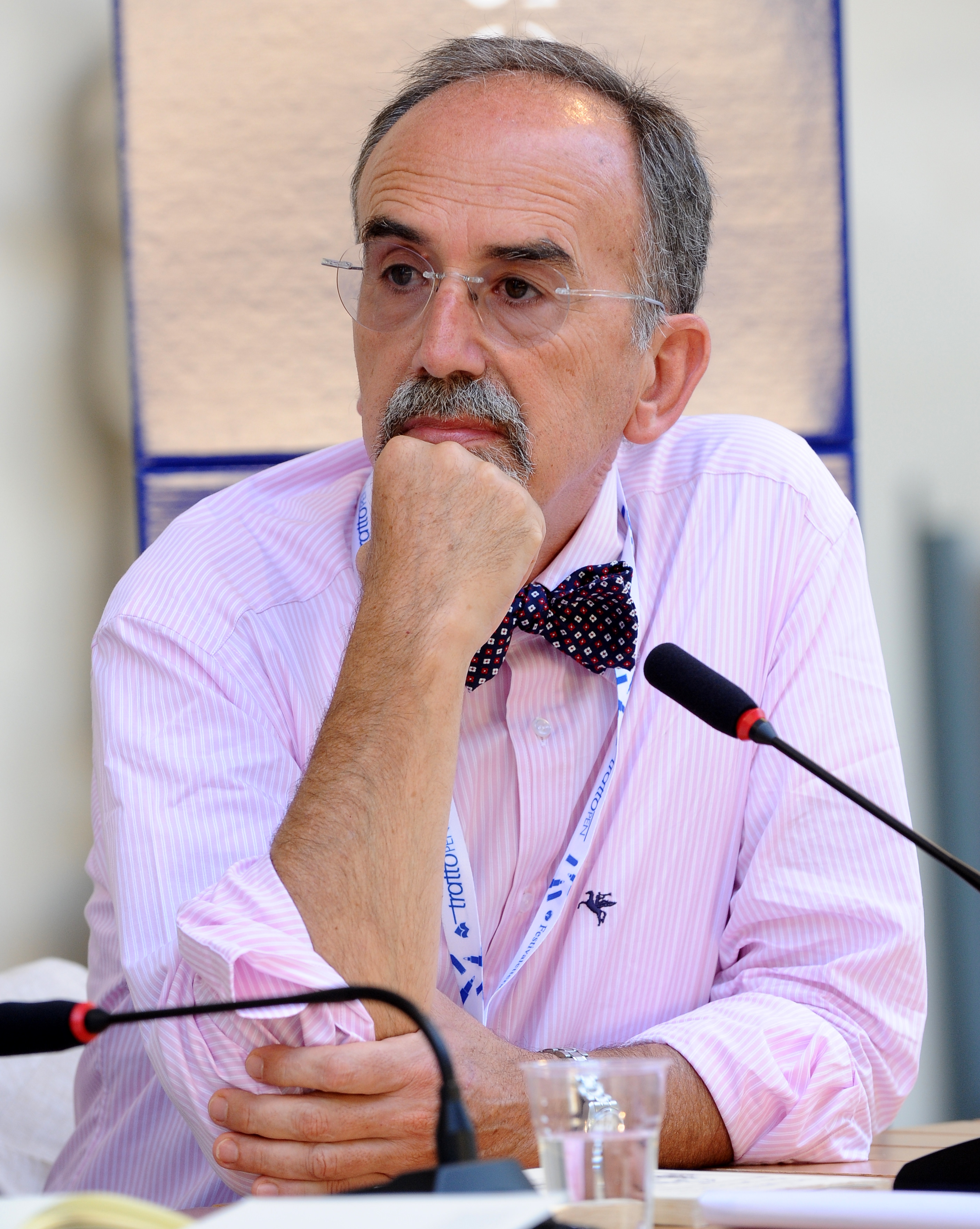 Paolo Cornaglia Ferraris a Mantova per il Festivaletteratura 2012.